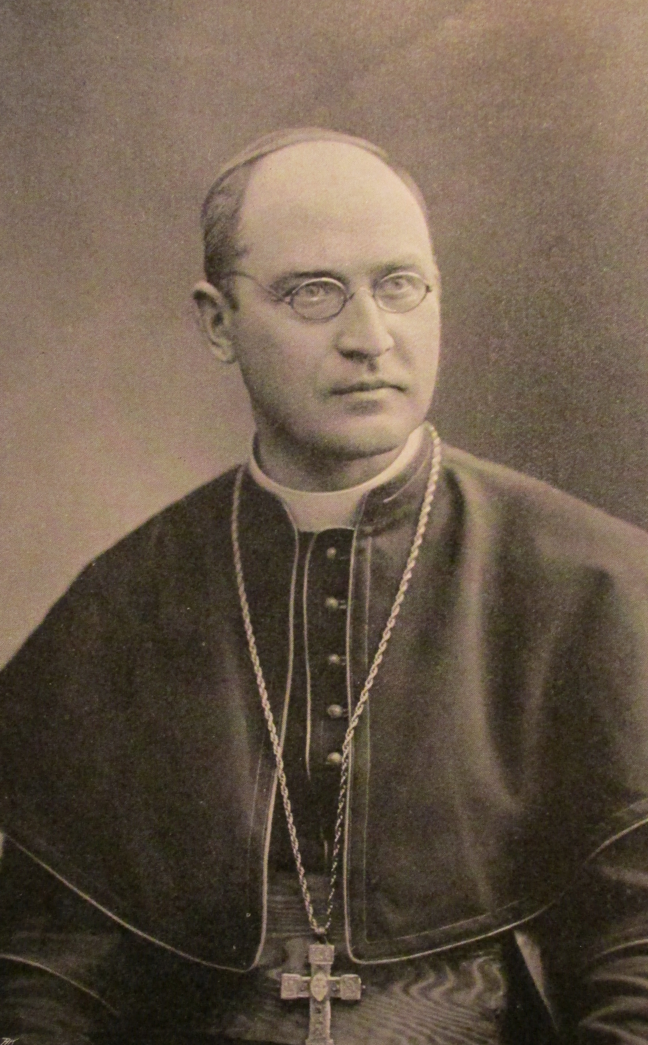 Litoměřický biskup Josef Gross mezi lety 1910–1931, výřez